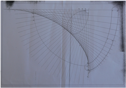 Construcción gráfica de la directriz normal. La tangencial es su evoluta.